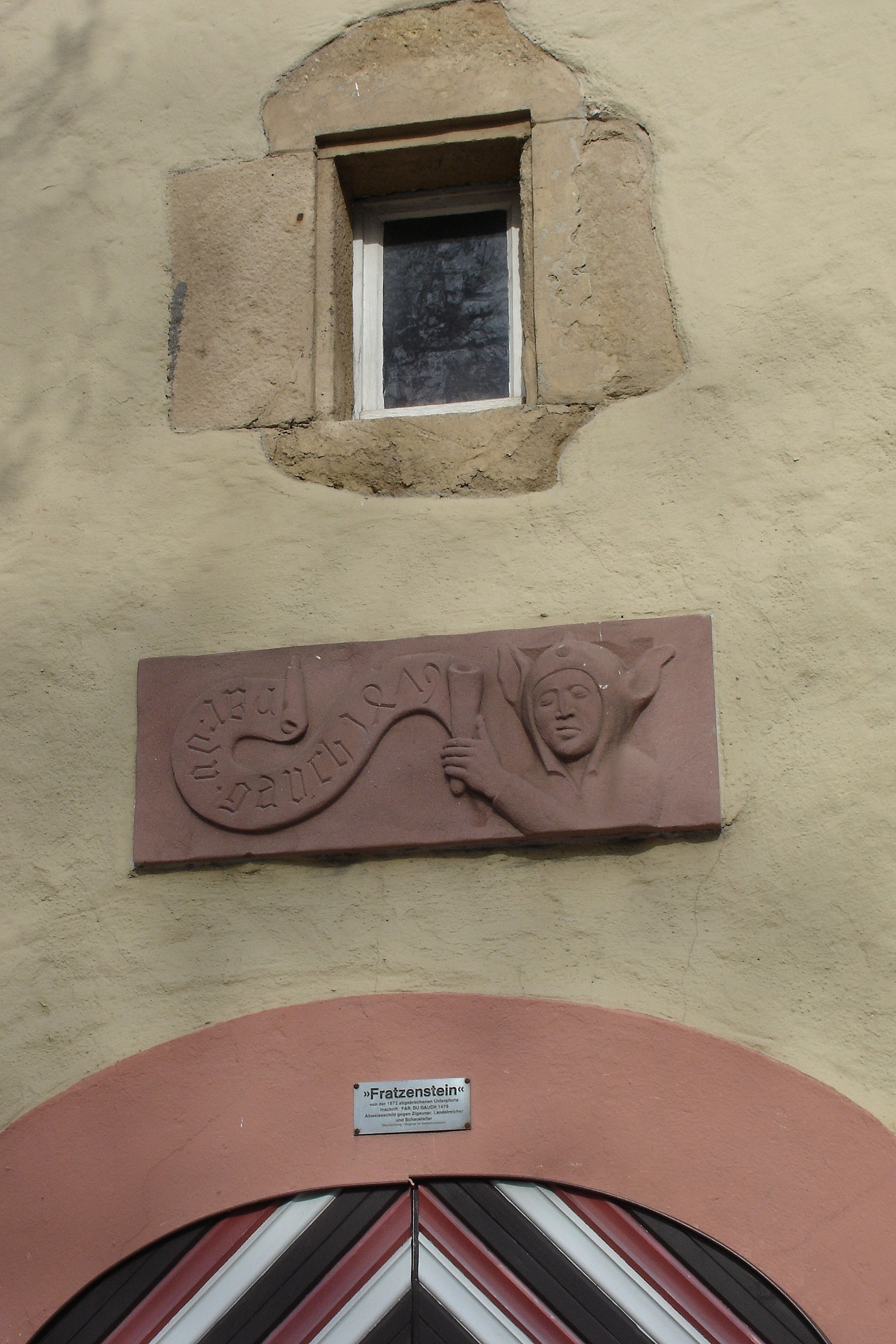 Kopie des Originals aus dem Museum, Ffm-Bergen-Enkheim